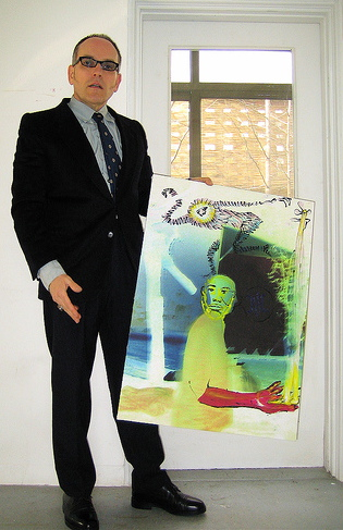 Alfred 23 Harth e sua arte